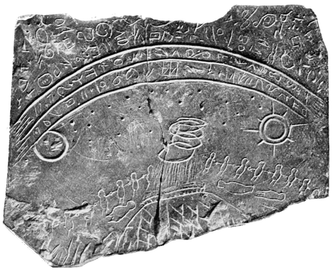 Slate tablet from Davenport